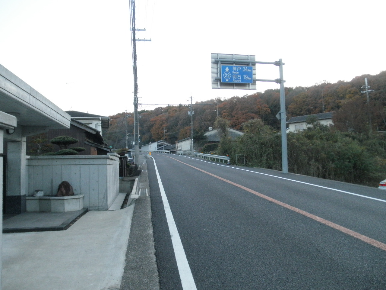 兵庫県三木市福井3丁目 兵庫県道22号神戸三木線